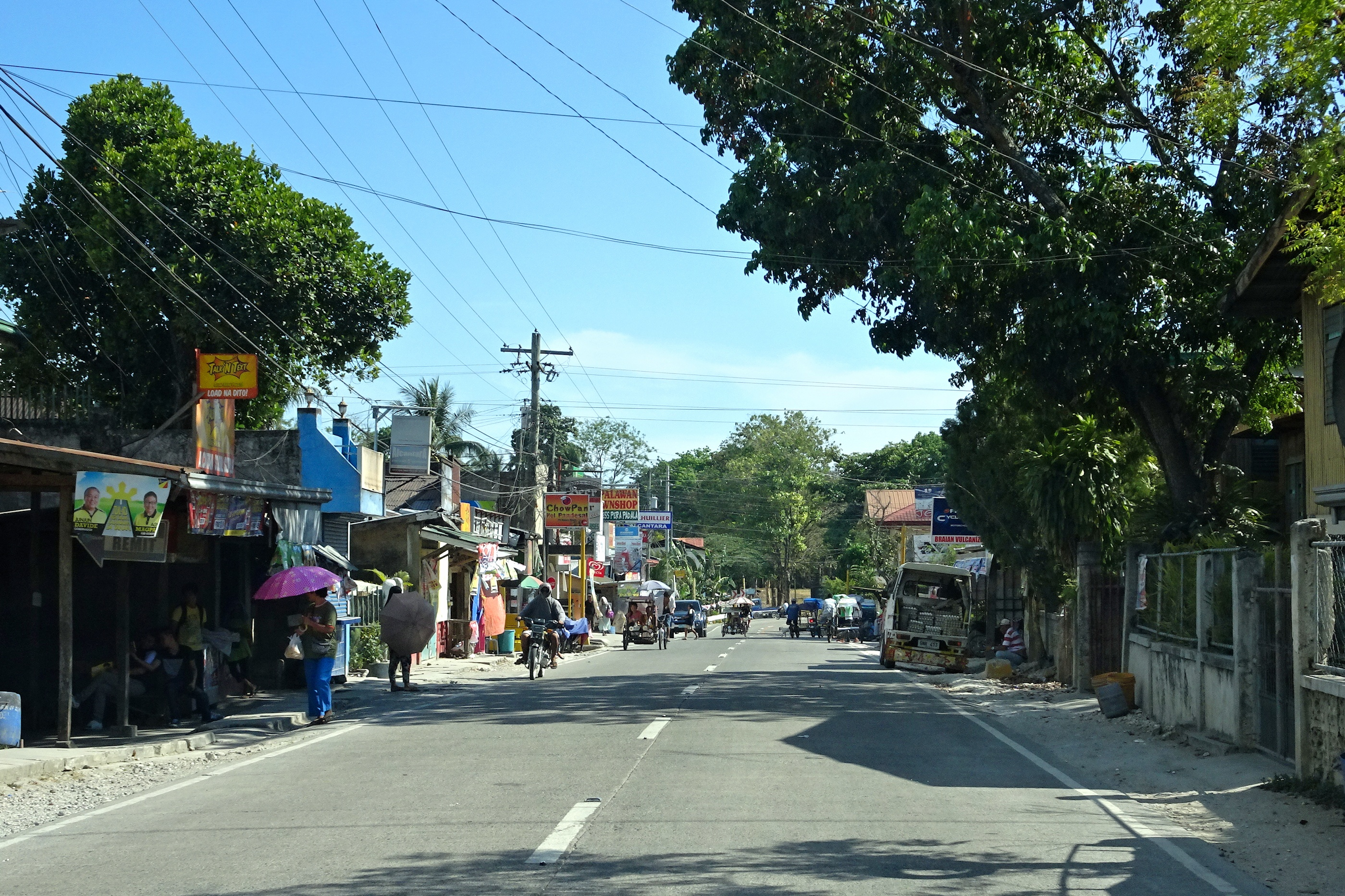 Alcantara, Cebu, Philippines